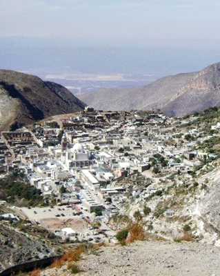 Vista de real de catorce